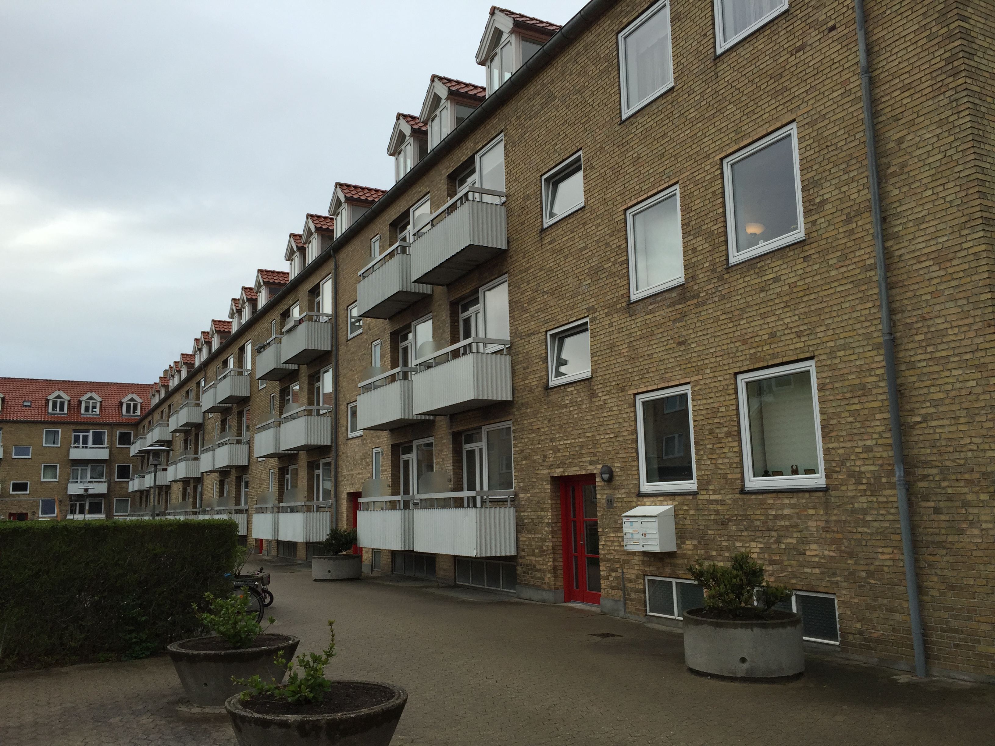 Christian X's Allé 26, Kongens Lyngby